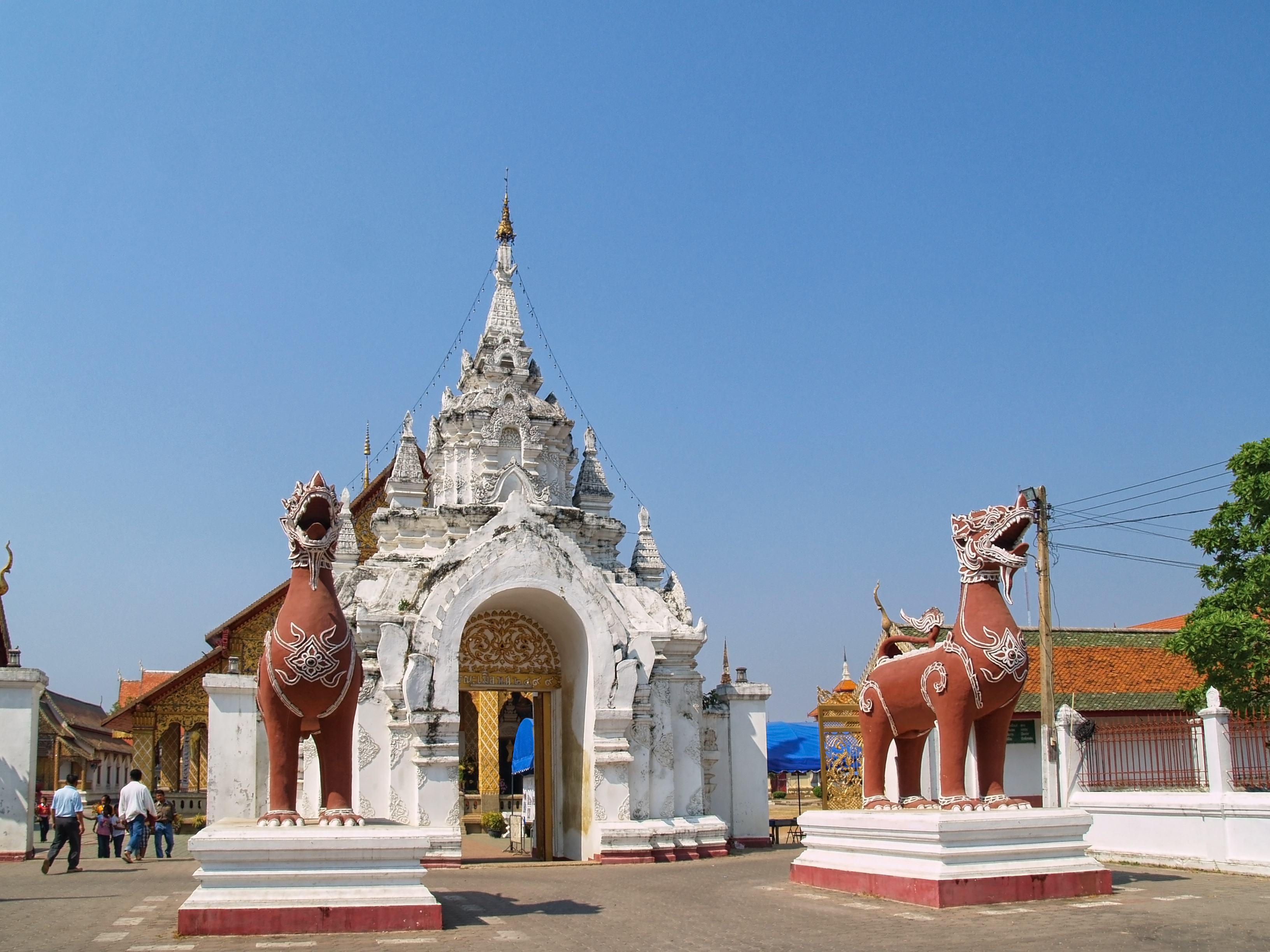 วัดพระธาตุหริภุญชัย